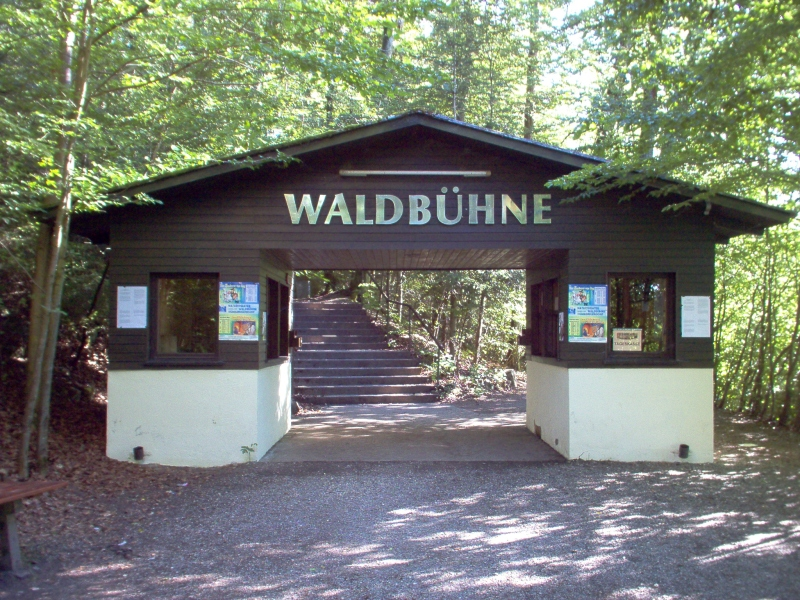 Eingangsbereich der Waldbühne Sigmaringendorf